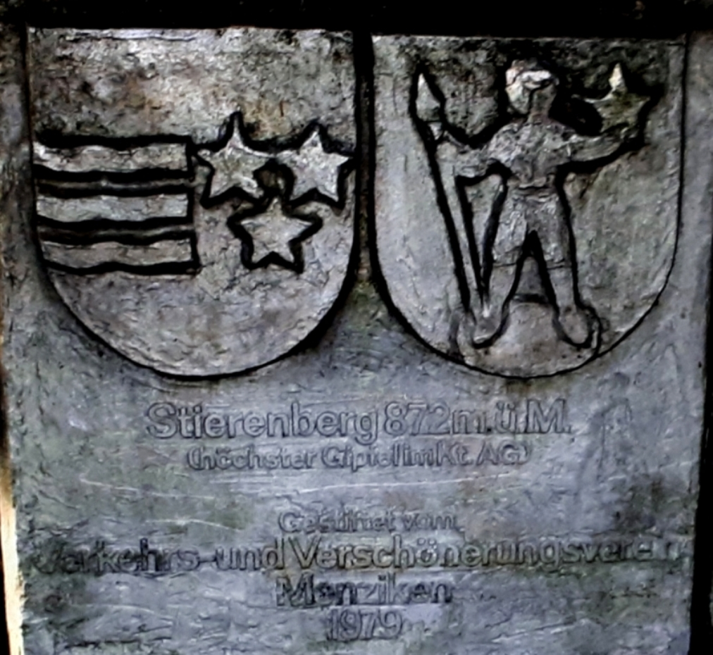 Stierenberg Gipfelstein